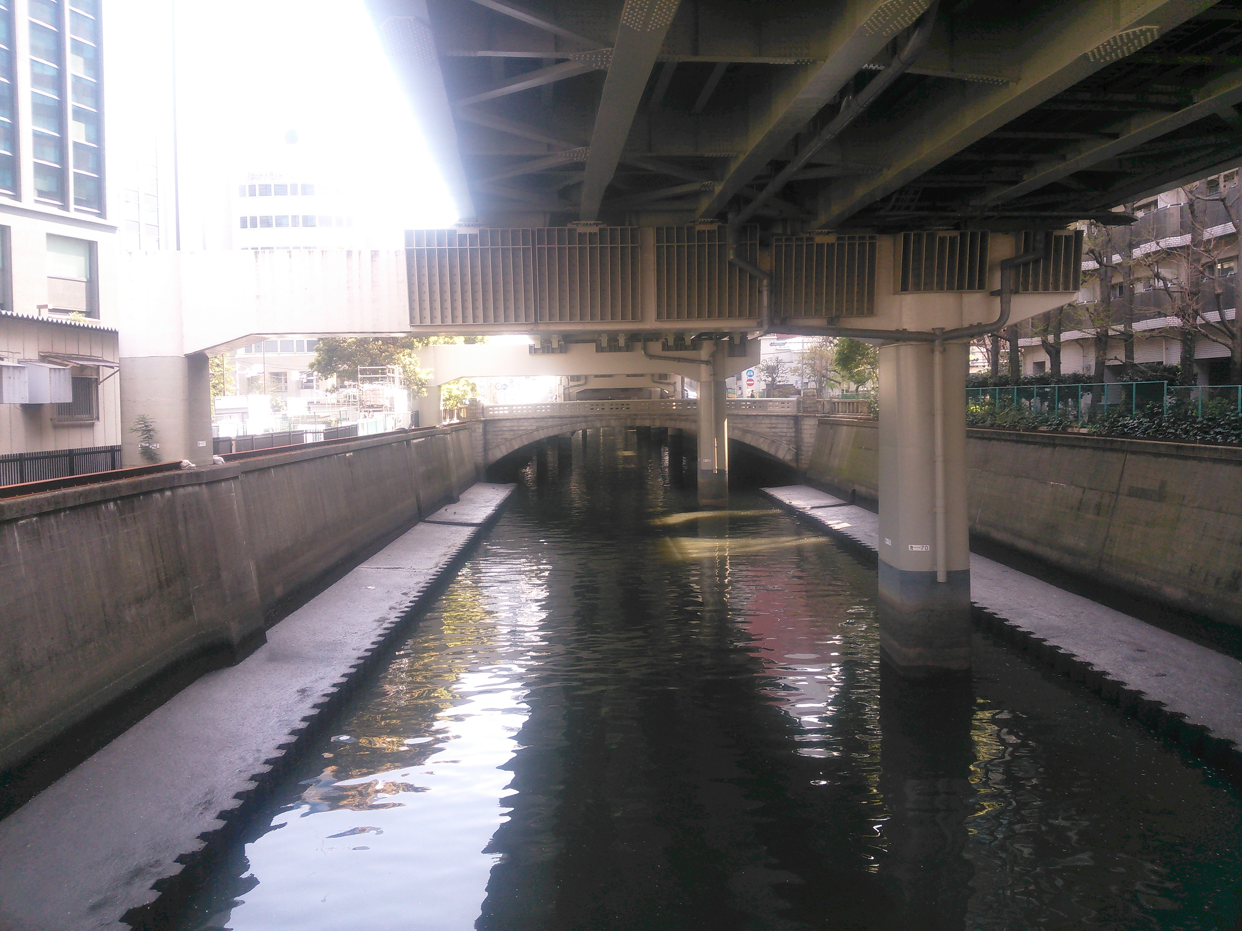 東京都千代田区、日本橋川に架かる堀留橋